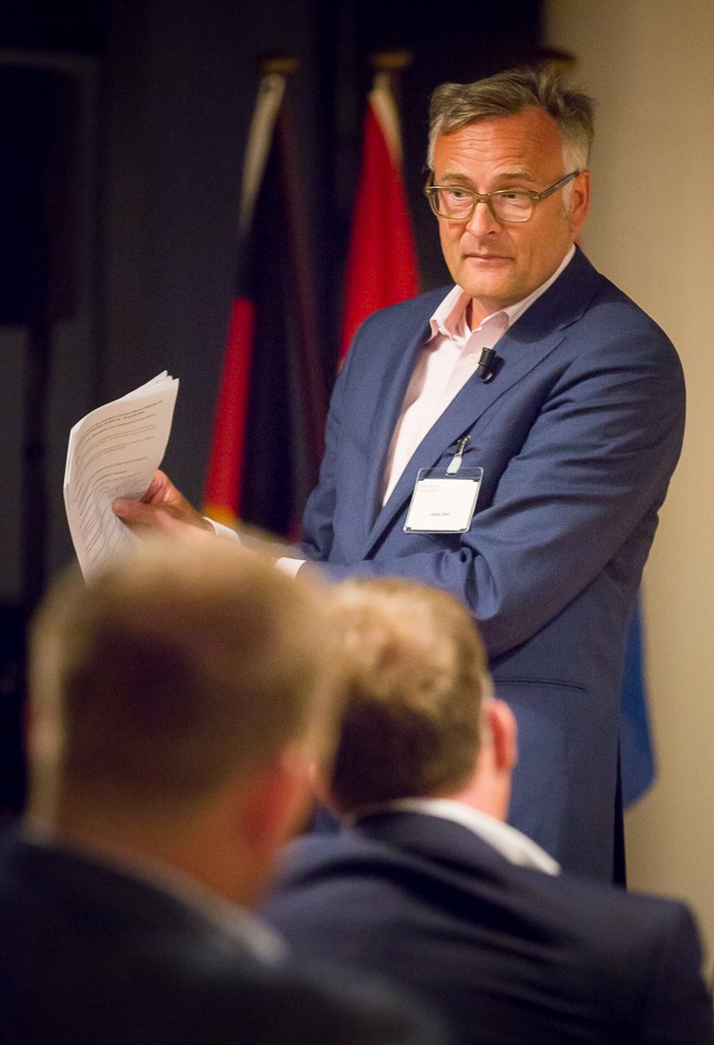 Jeroen Smit bij de Week Van De Ondernemer